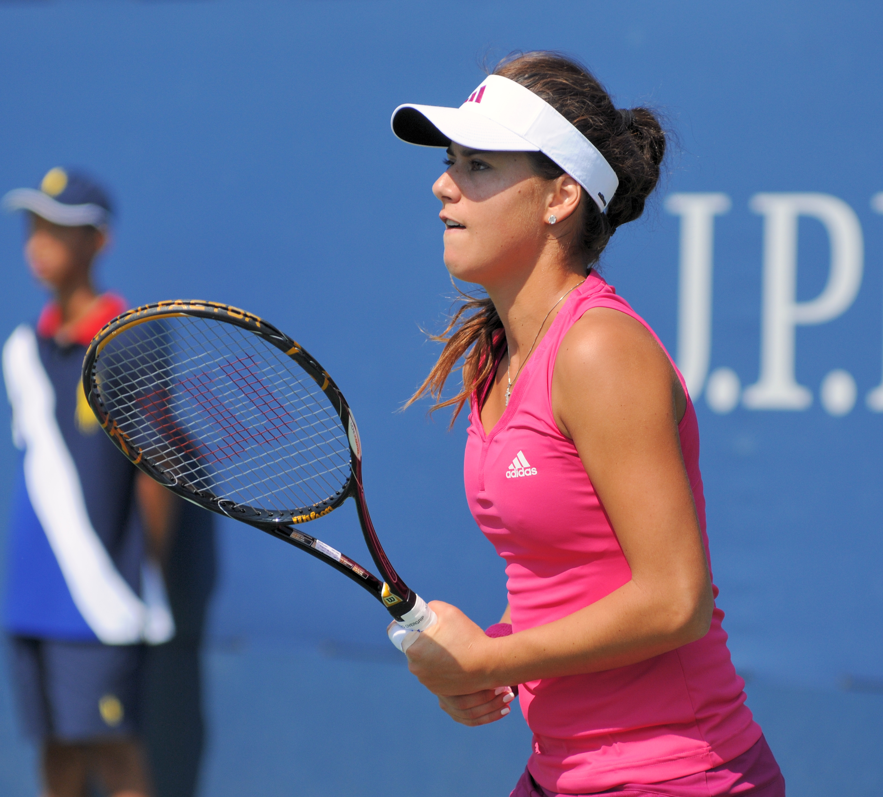 Sorana Cîrstea - US Open 2010